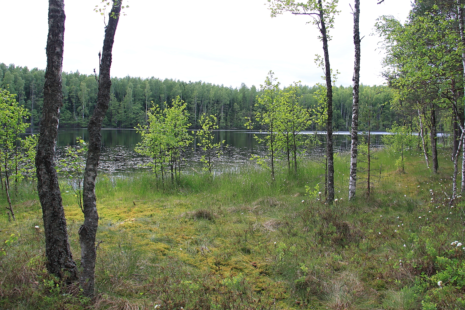 Jussi Väinjärv Põhja-Kõrvemaal